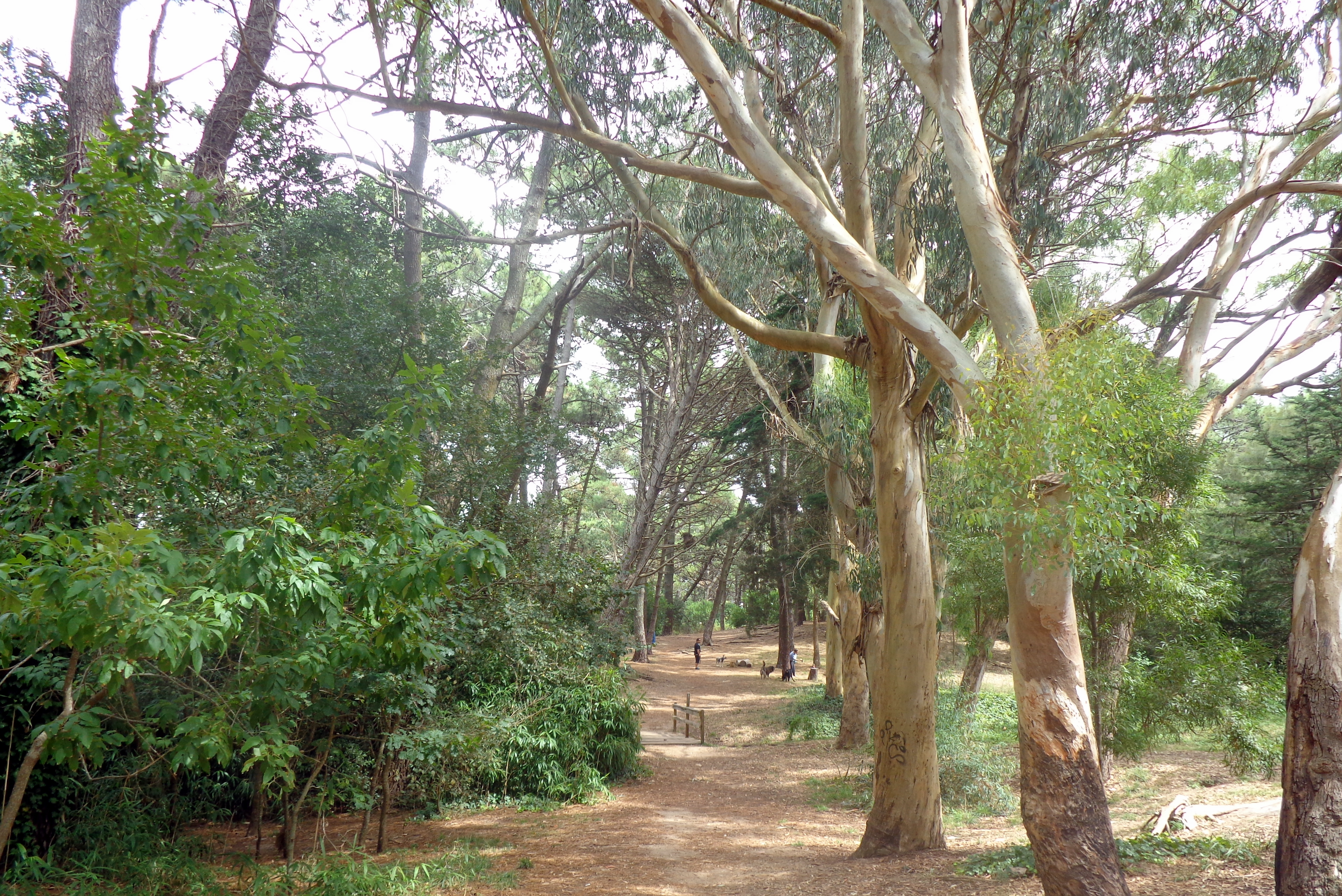 Villa Gesell, Provincia de Buenos Aires, Argentina.